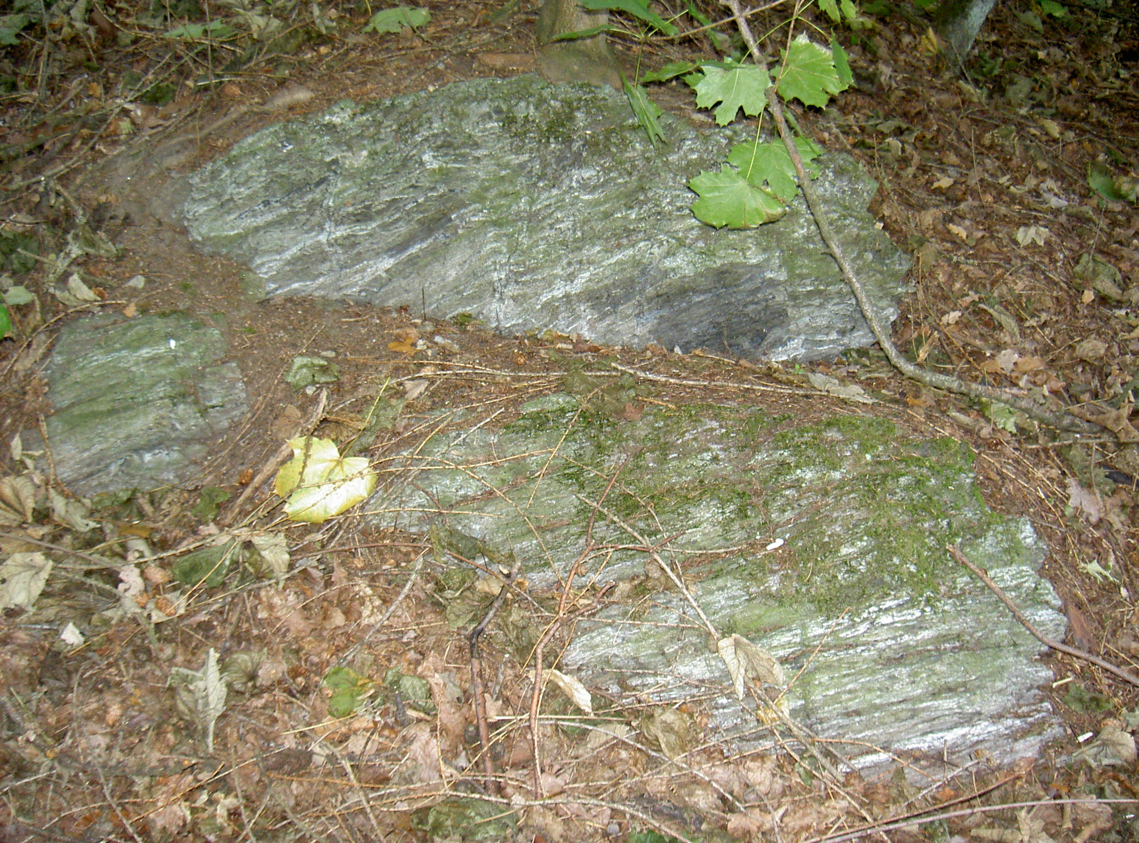 Nikolausberg Floß (Upper Palatinate)